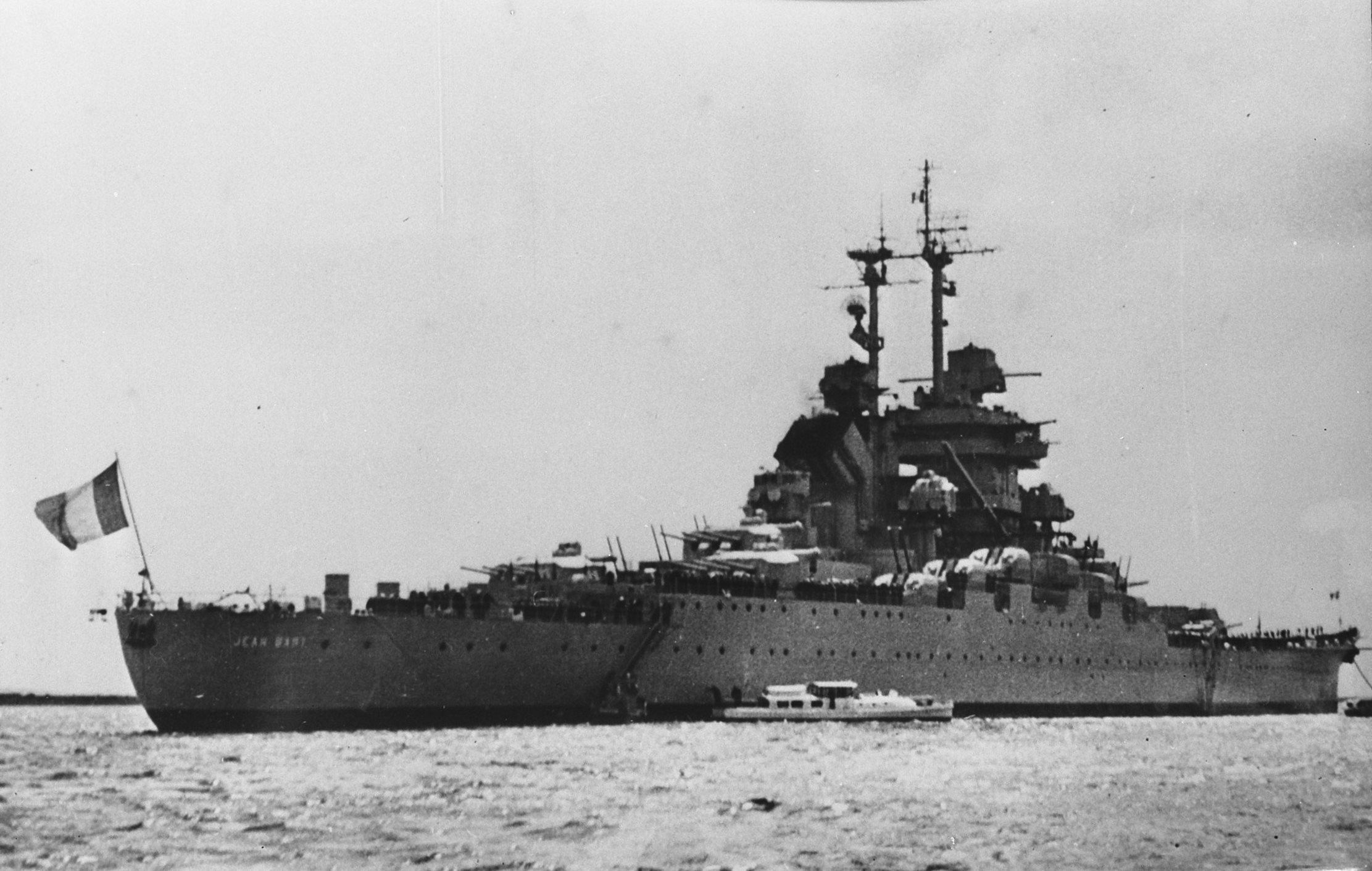 Collectie / Archief : Fotocollectie Anefo Reportage / Serie : [ onbekend ] Beschrijving : Kwestie Suezkanaal. Slagschip "Jean Bart" van de Franse marine Datum : 3 augustus 1956 Locatie : Frankrijk, Suez Trefwoorden : kanalen, marine, schepen Persoonsnaam : Jean Bart Fotograaf : Behrens, Herbert / Anefo Auteursrechthebbende : Nationaal Archief Materiaalsoort : Glasnegatief Nummer archiefinventaris : bekijk toegang 2.24.01.09 Bestanddeelnummer : 907-9214